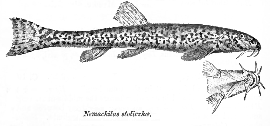 Nemacheilus stoliczkai = Triplophysa stoliczkai (Steindachner, 1866)